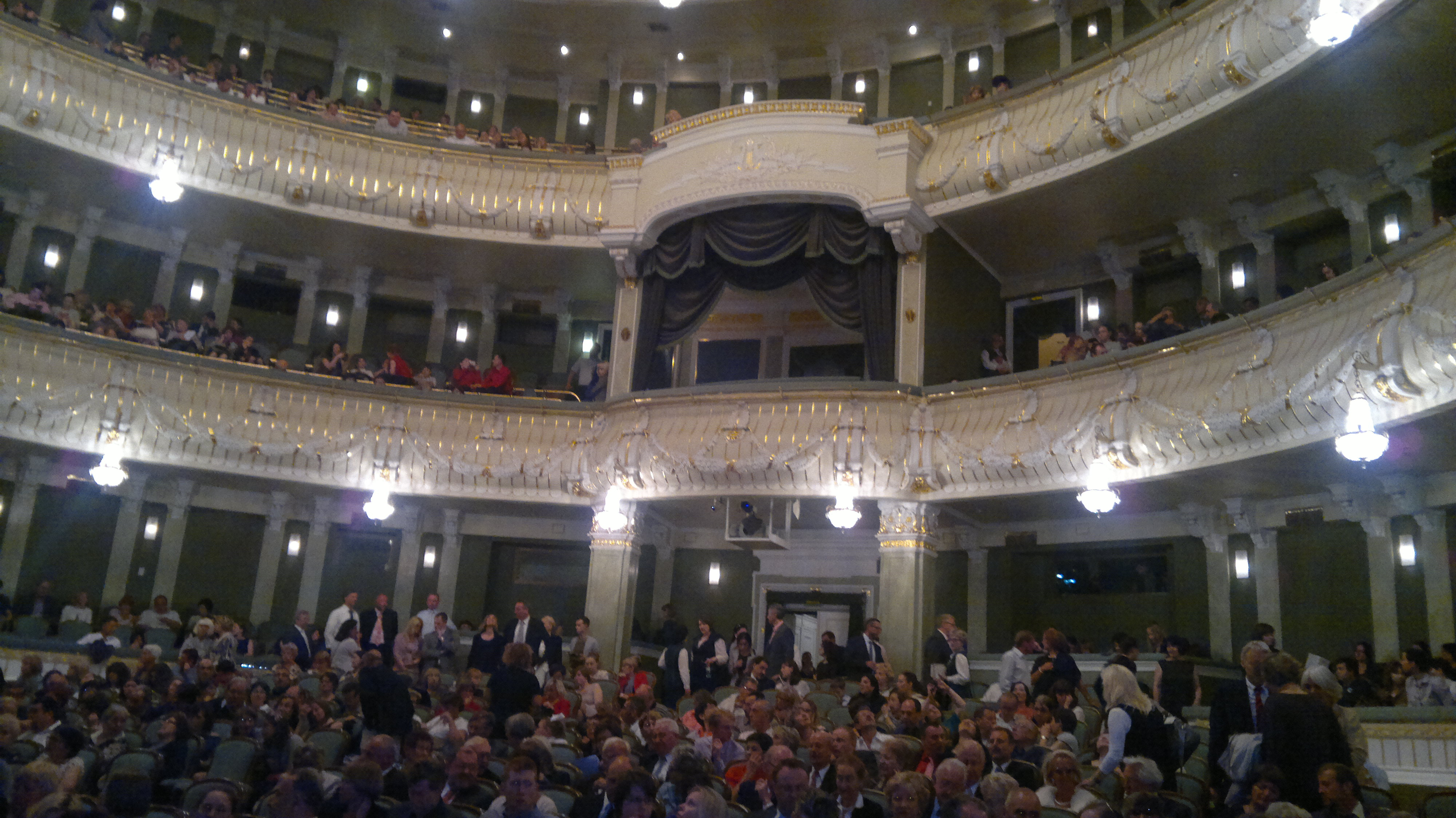 Новая сцена Большого театра